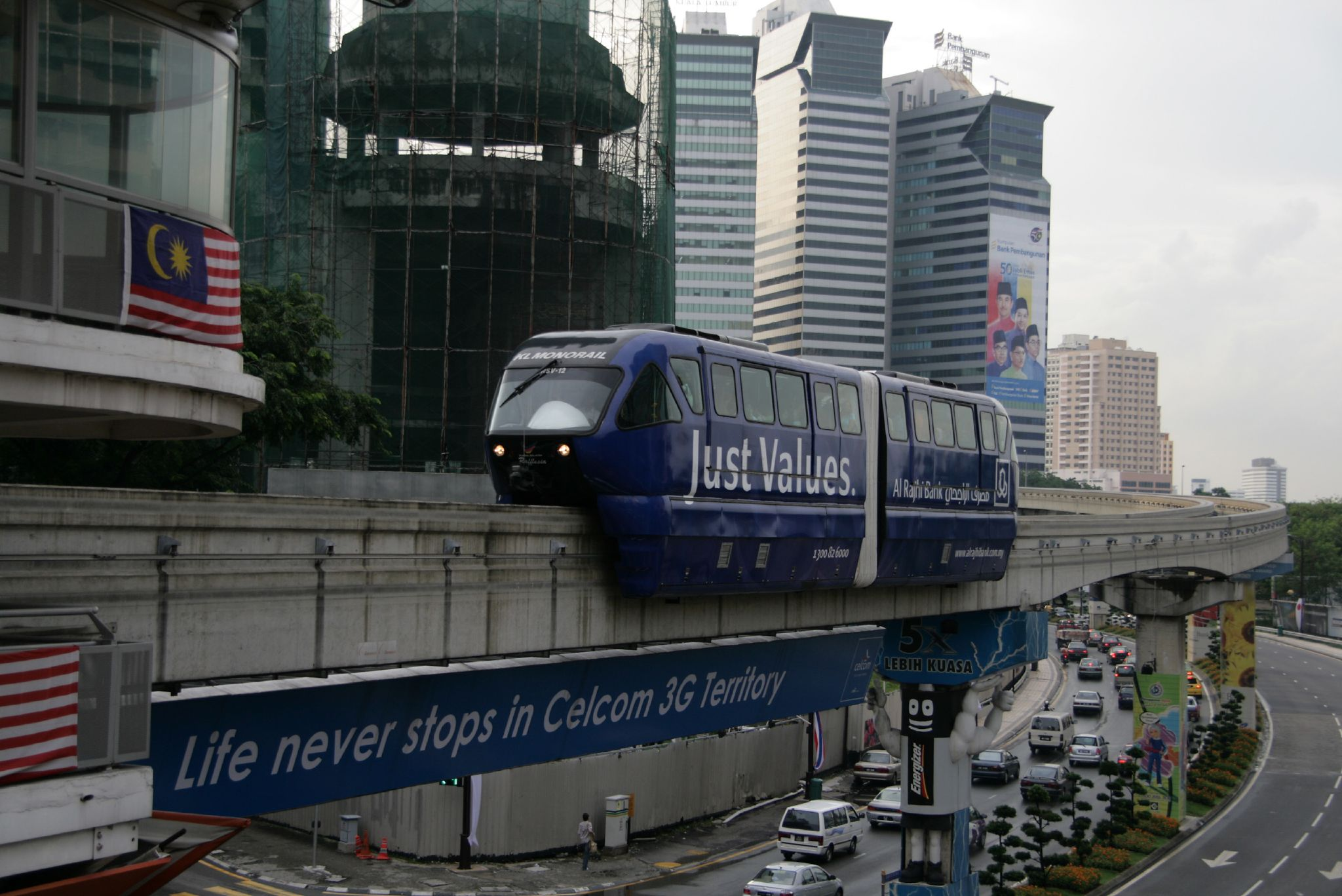 Kuala Lumpur Monorail